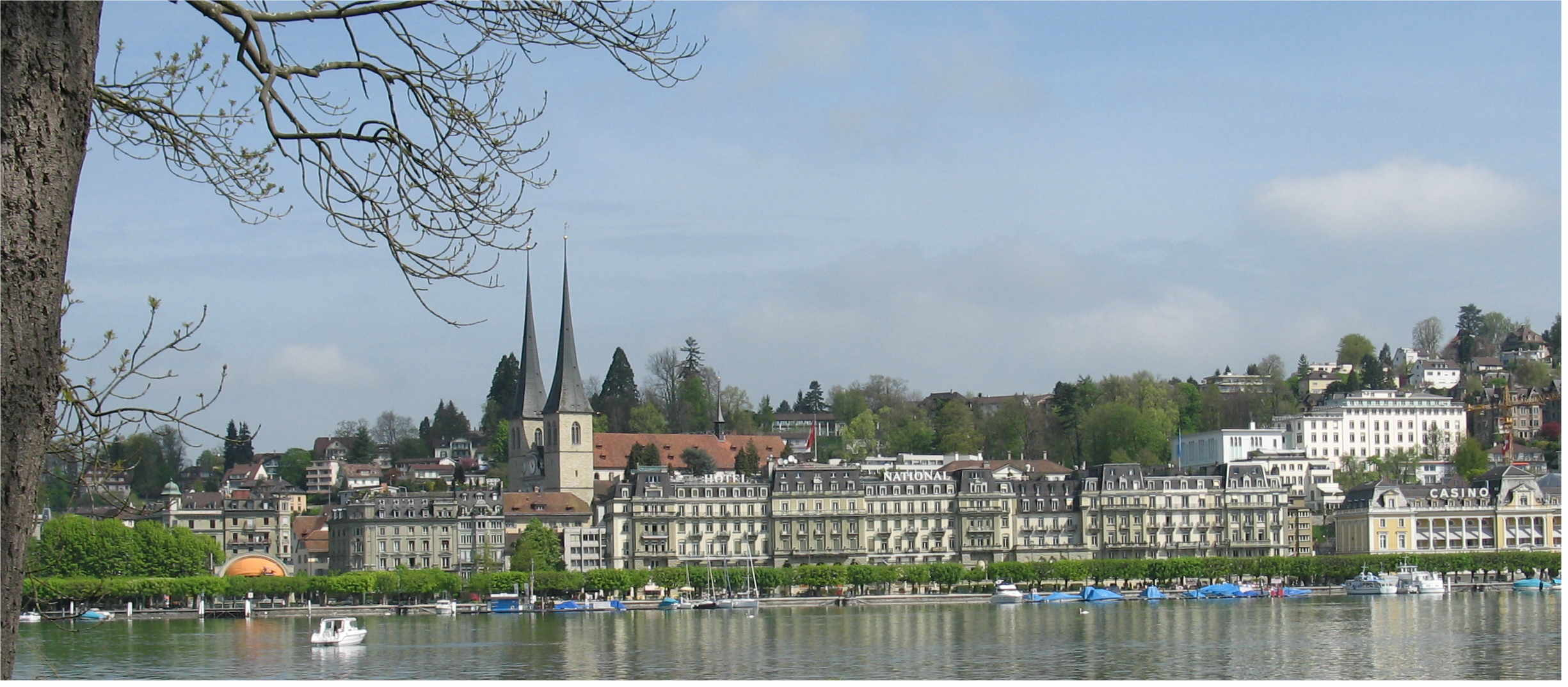 Luzern